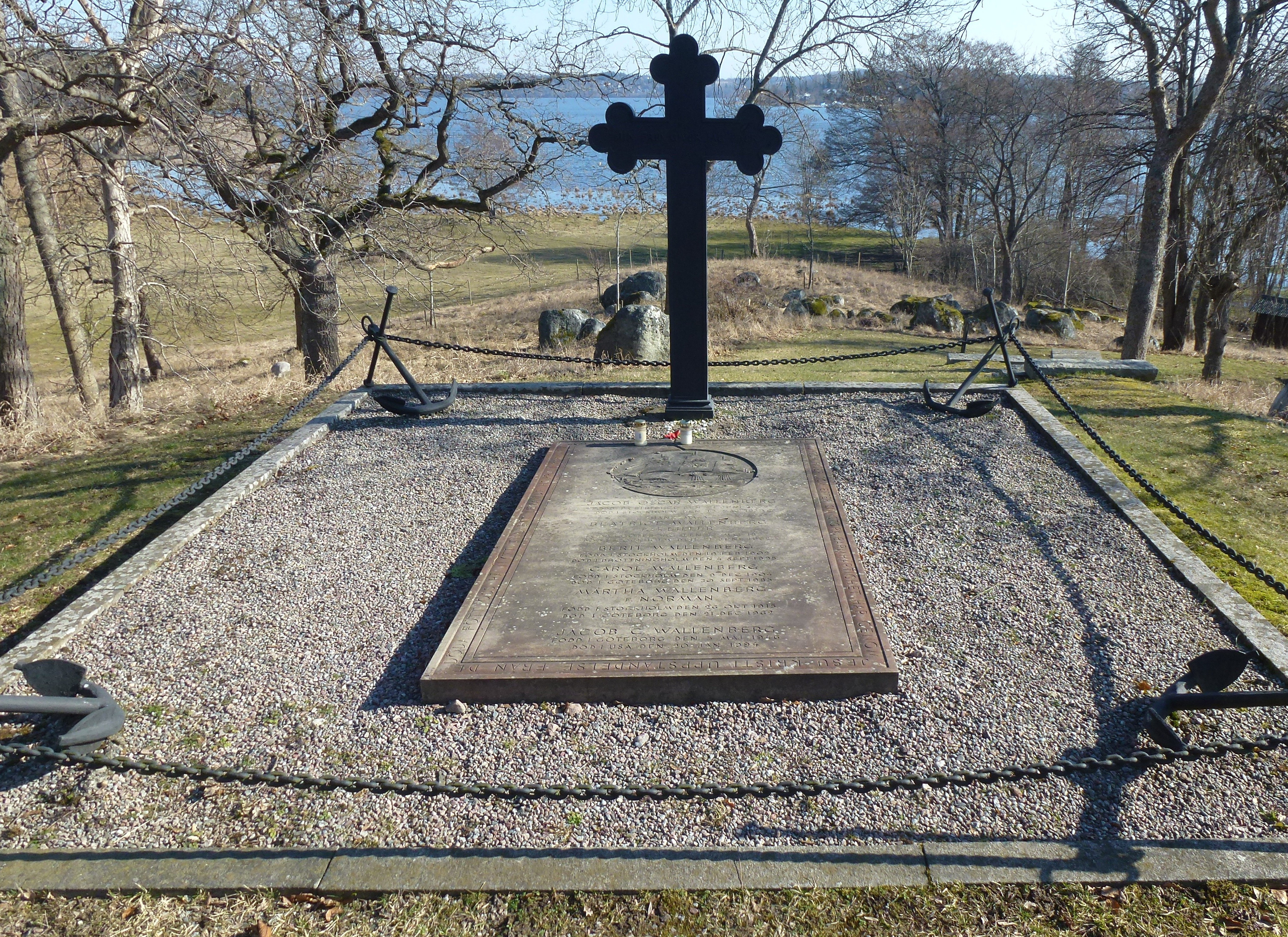 Wallenberg-mausoleum, Jacob Oscar Wallenberg